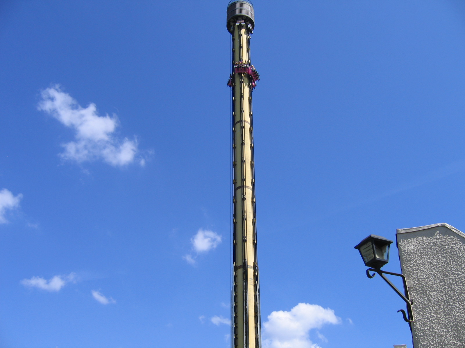 Dalton Terror , tour de chute libre à Walibi Belgium